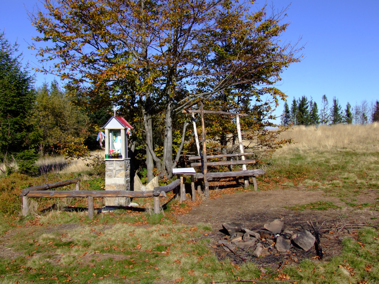 Polana Jaworze na Łopieniu (Beskid Wyspowy).